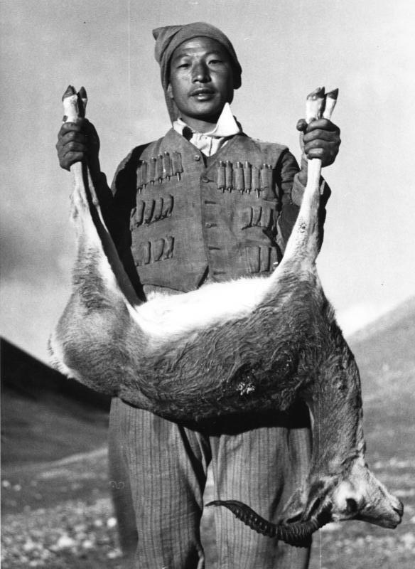 Gayamtsona [Gyamtsona], Akey mit Gazelle